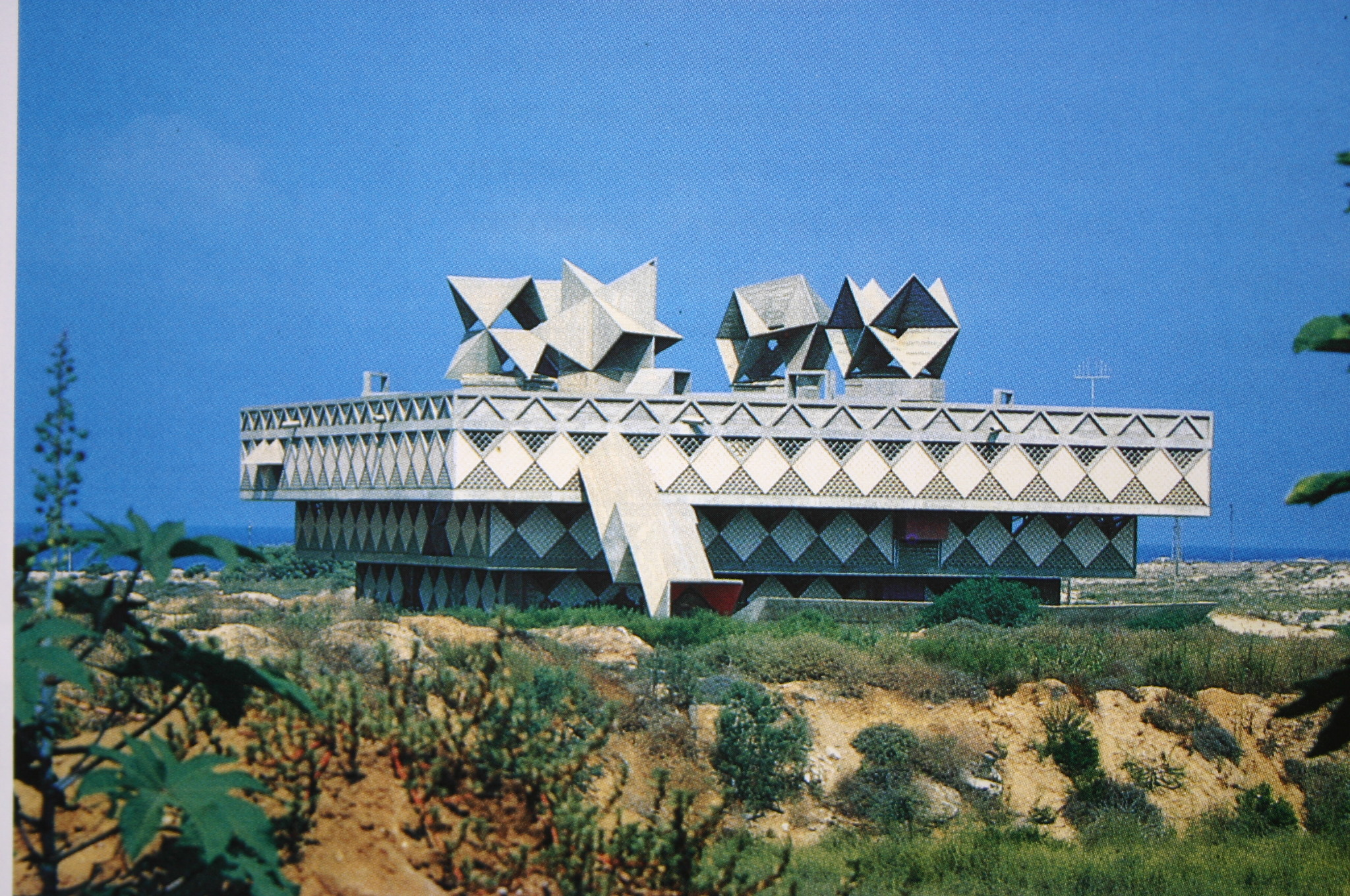 bat-yam municipality